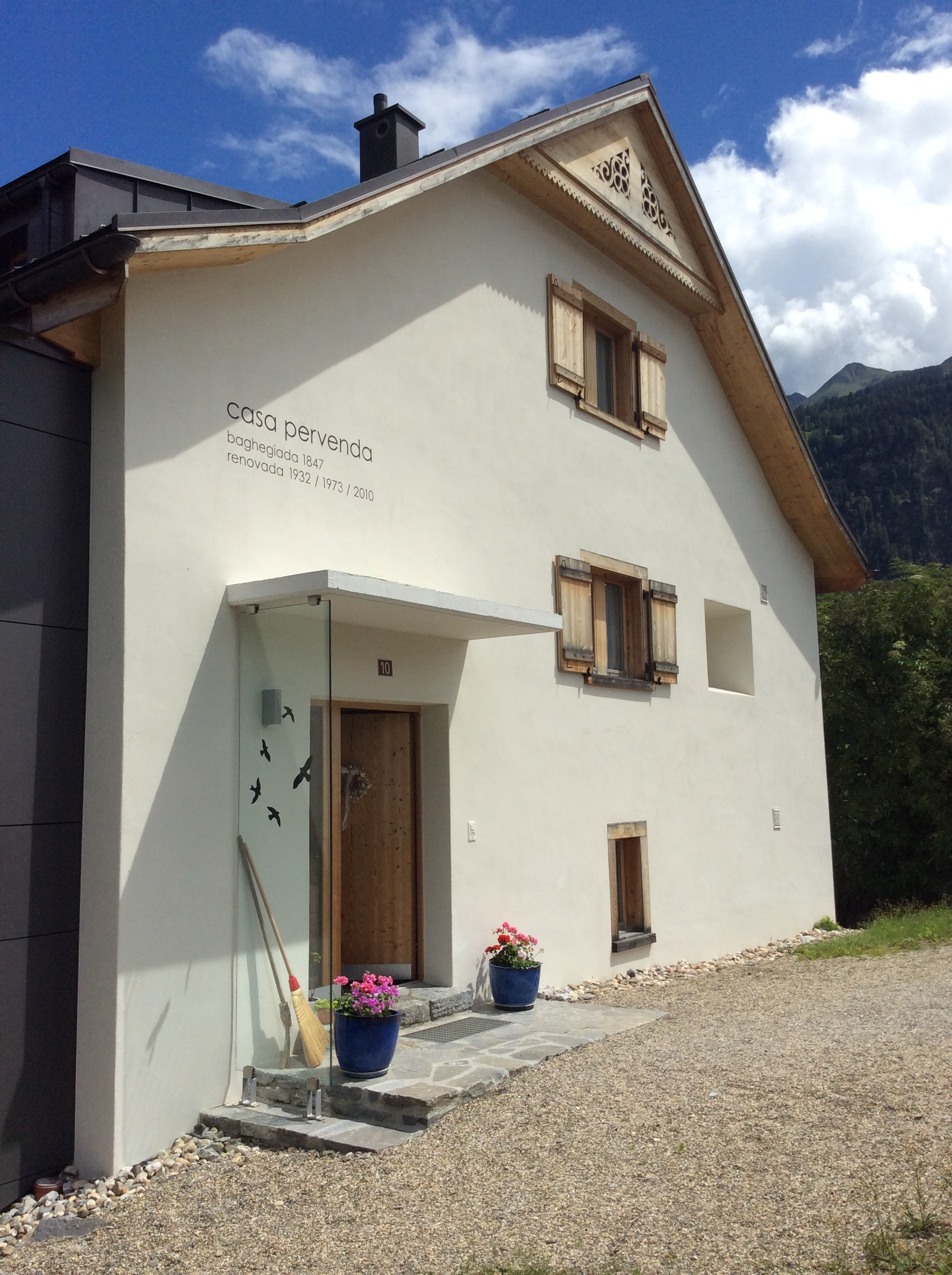 Das 2010 neu erstellte reformierte Pfarrhaus in Sagogn in der Surselva.